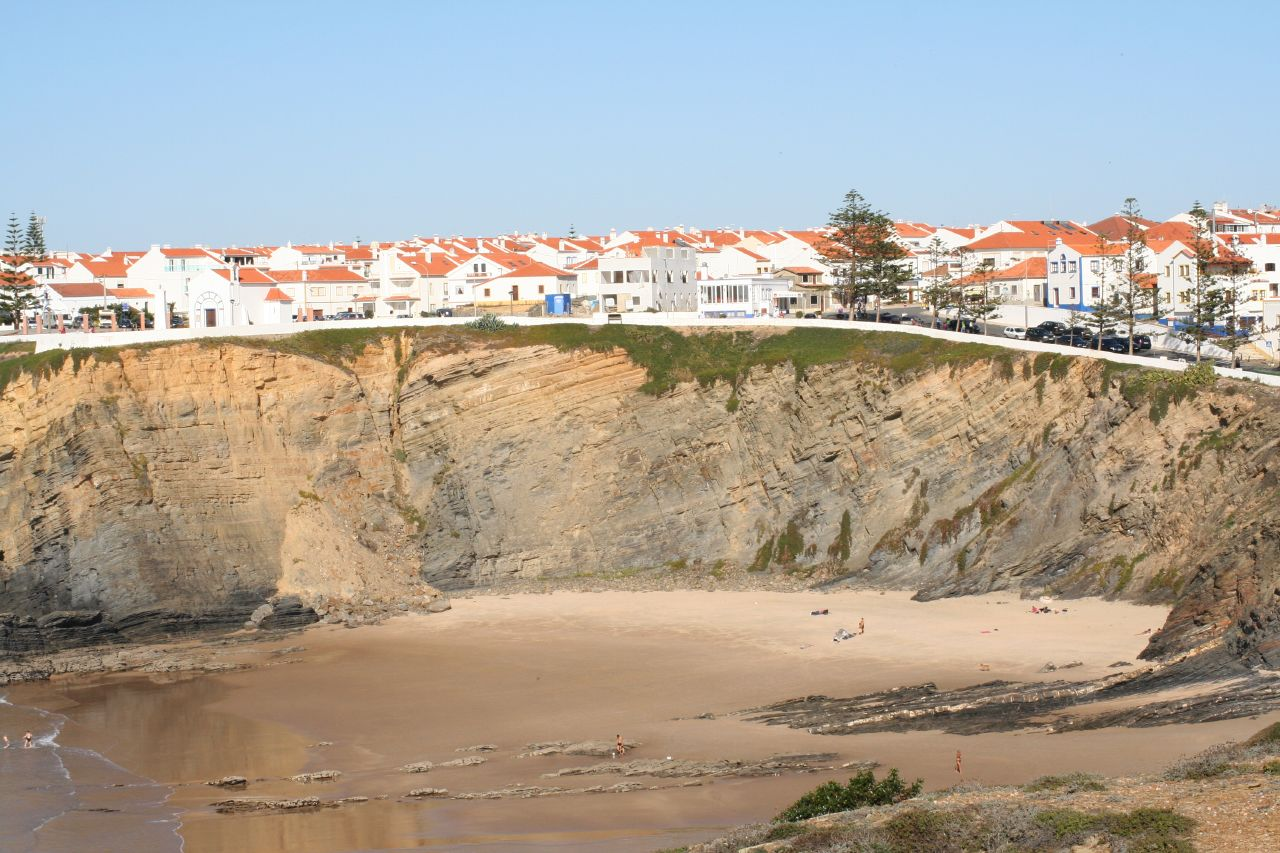 Zambujeira do Mar